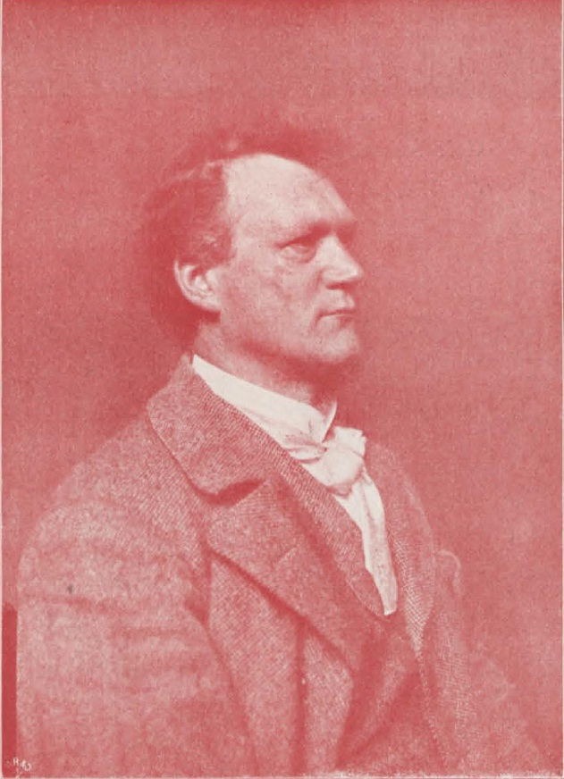 Joseph Uphues (1850-1911), ein deutscher Bildhauer. Foto von 1899 (oder früher).